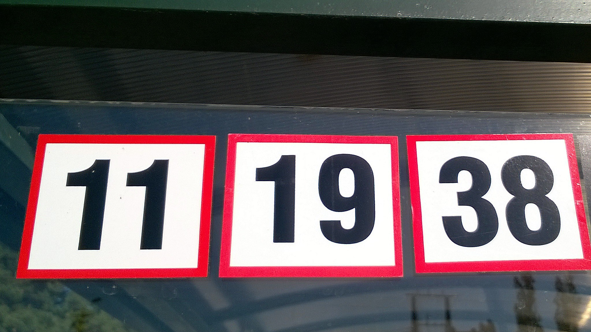 Oznaczenia toruńskiej komunikacji88